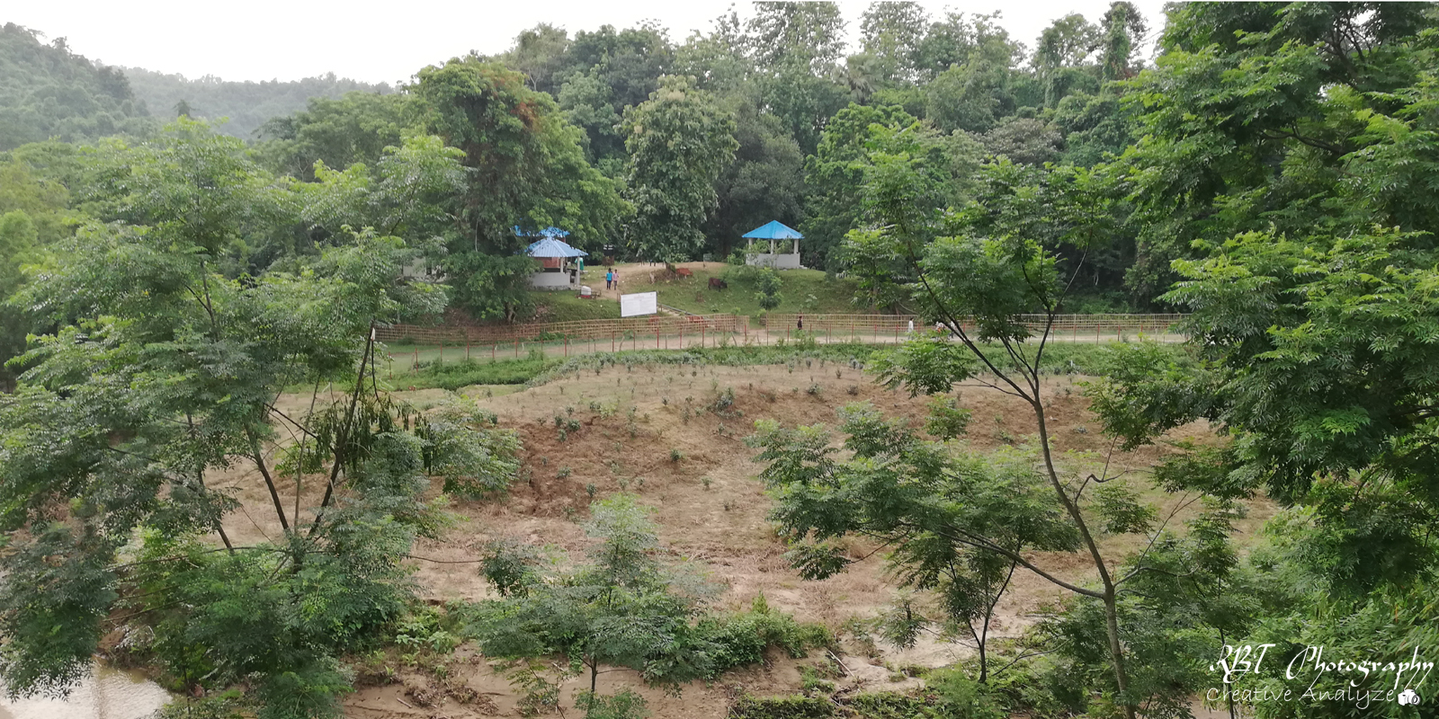 মিশ্র চিরসবুজ বনসমৃদ্ধ এ অভয়ারণ্যের প্রধান বৃক্ষ গর্জন, চাপালিশ, সেগুন, কড়ই, মেহগনি ও চুন্দুল।